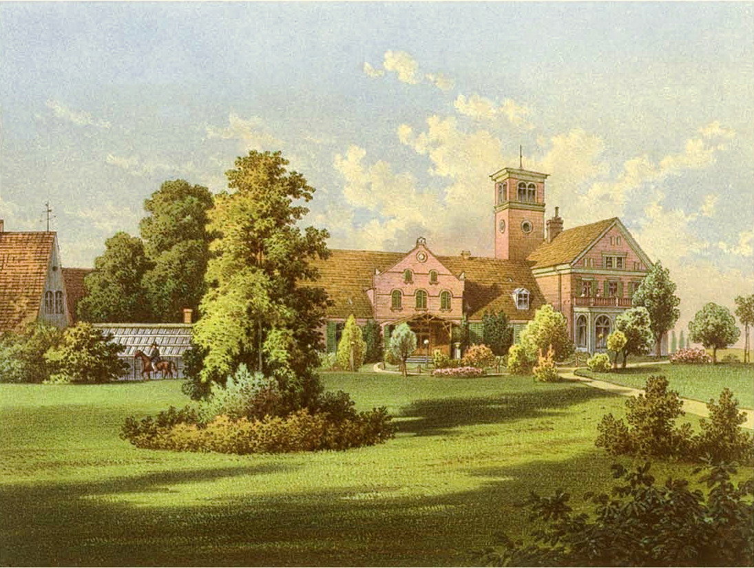 Rittergut Lübtow, Lithographie von Alexander Duncker, 1869